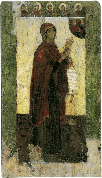 Virgin Bogolubskaya. Боголюбская икона Божией Матери